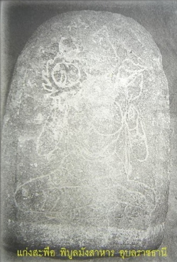 เทวรูป พระพือ วัดสระแก้ว